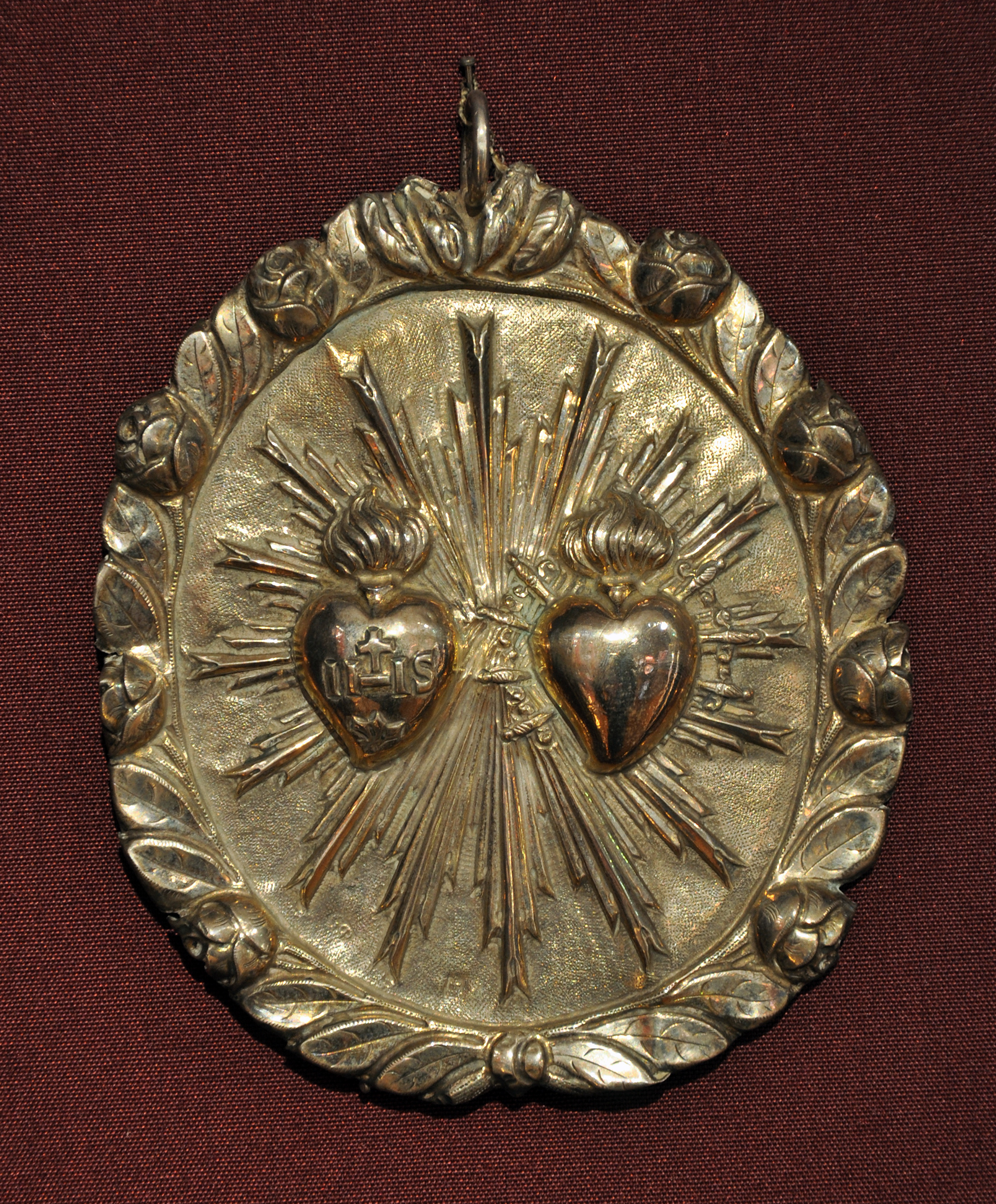 Ex-voto, XIXème ou XXème siècle. Musée du Coeur ( collection du docteur Boyadjian et de son épouse ), MRAH, Parc du Cinquantenaire, Bruxelles.